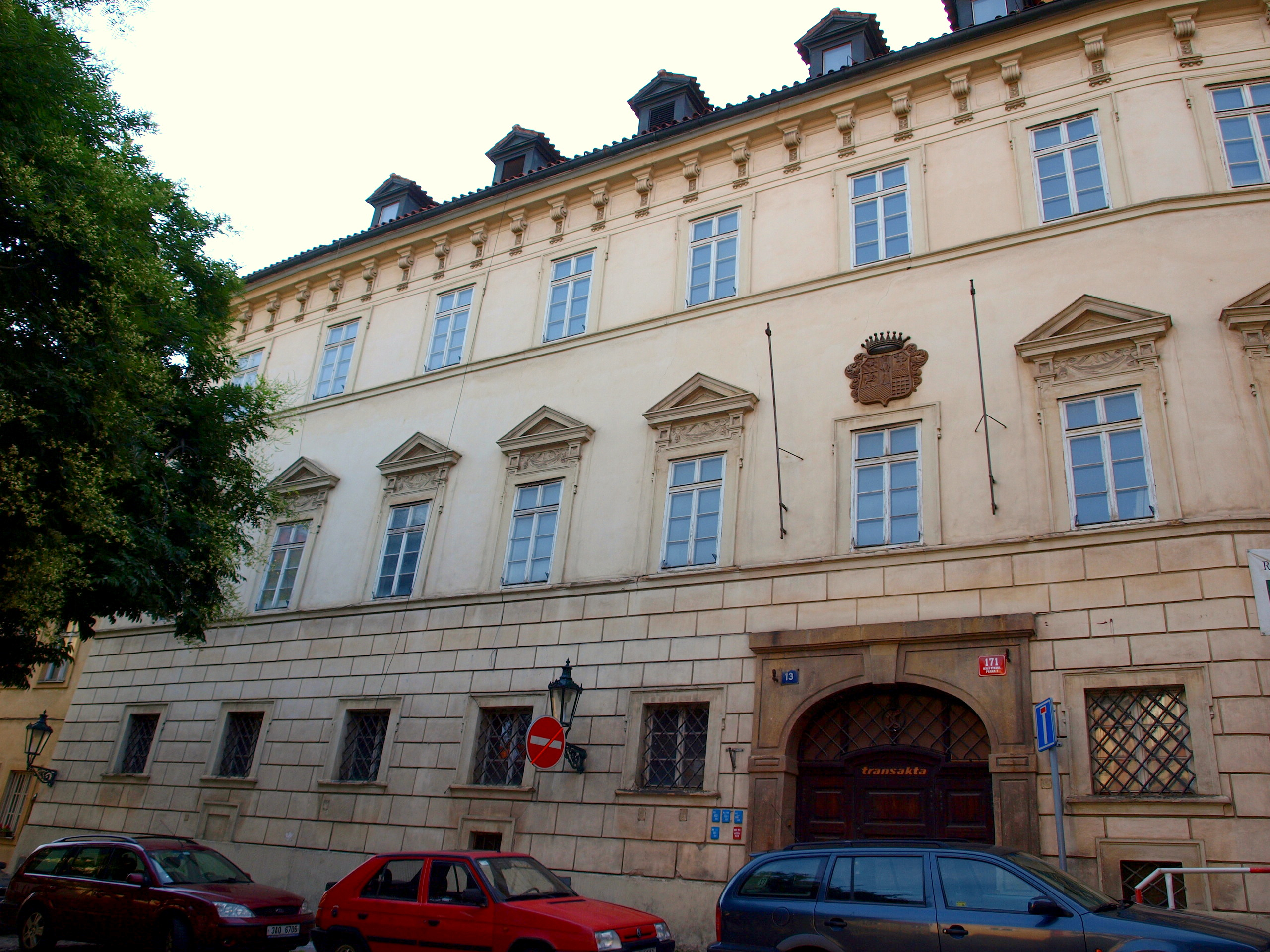 Palác Schützenů - erb